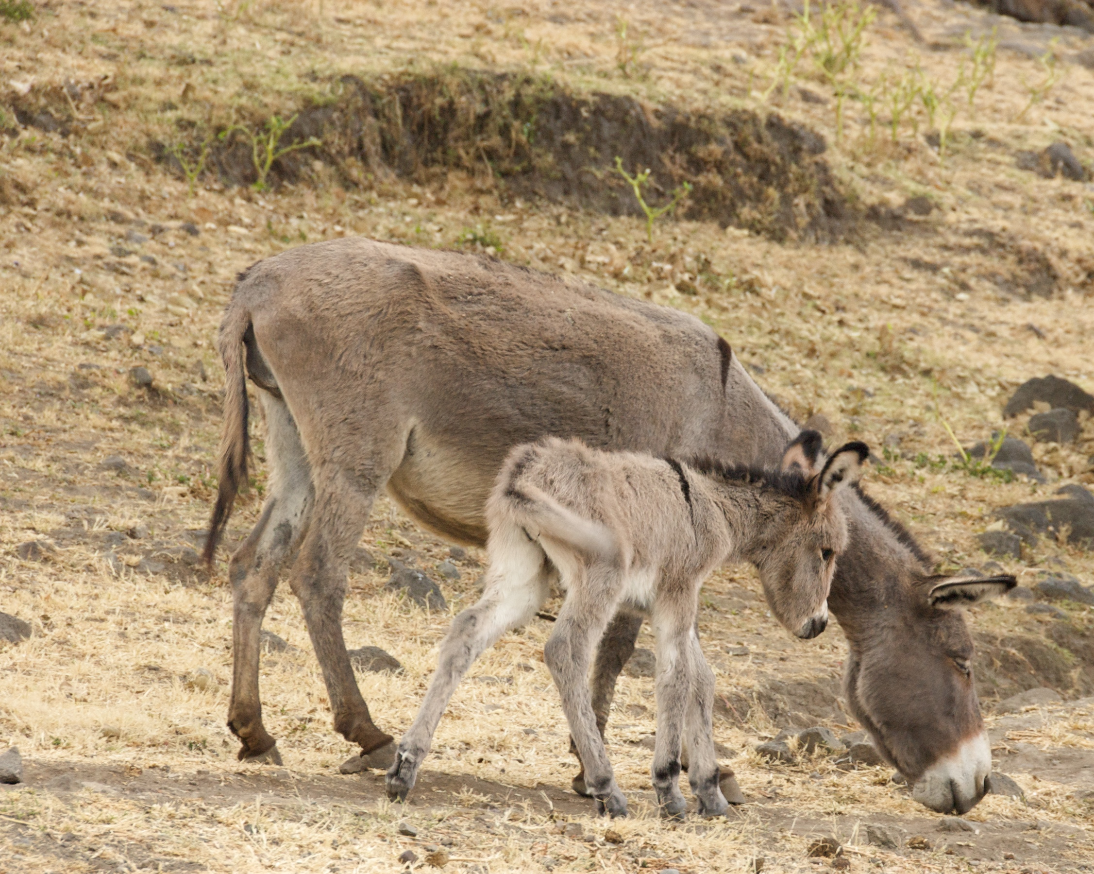 Near Lalibela, Ethiopia.